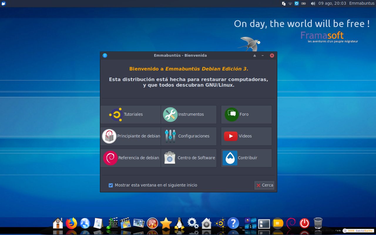 Emmabuntüs DE 3 (Debian 10 Buster) : Escritorio XFCE